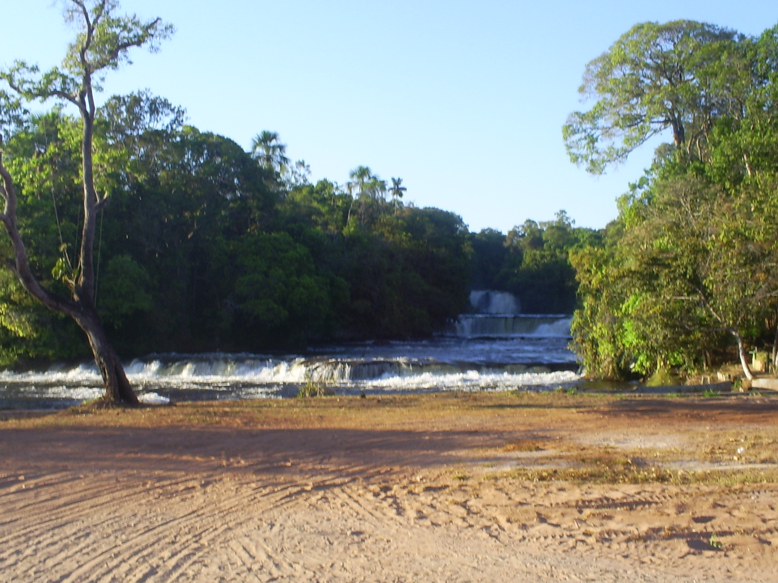 Outro conjunto de quedas,do Salto do Curuá